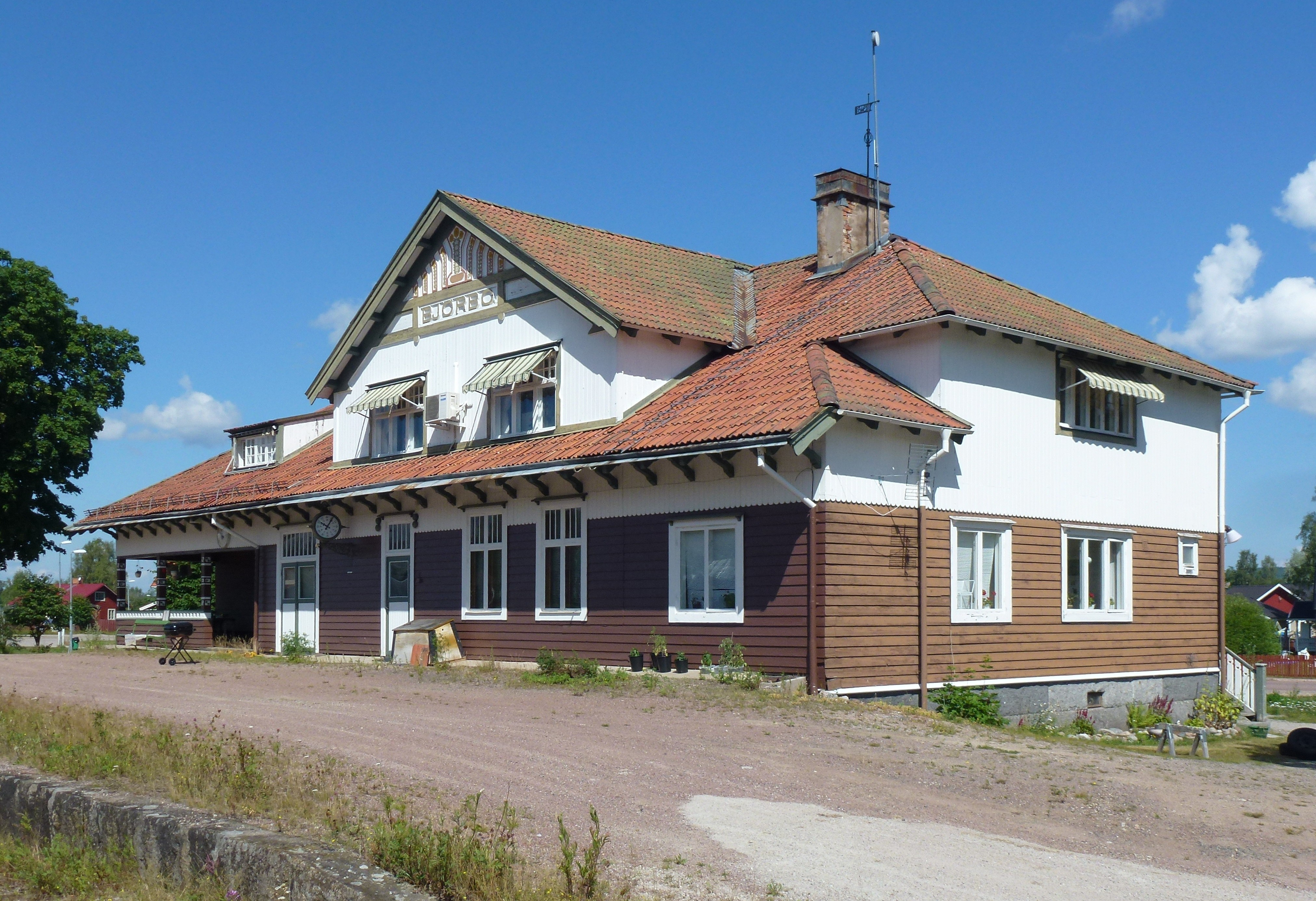 Björbo stationshus